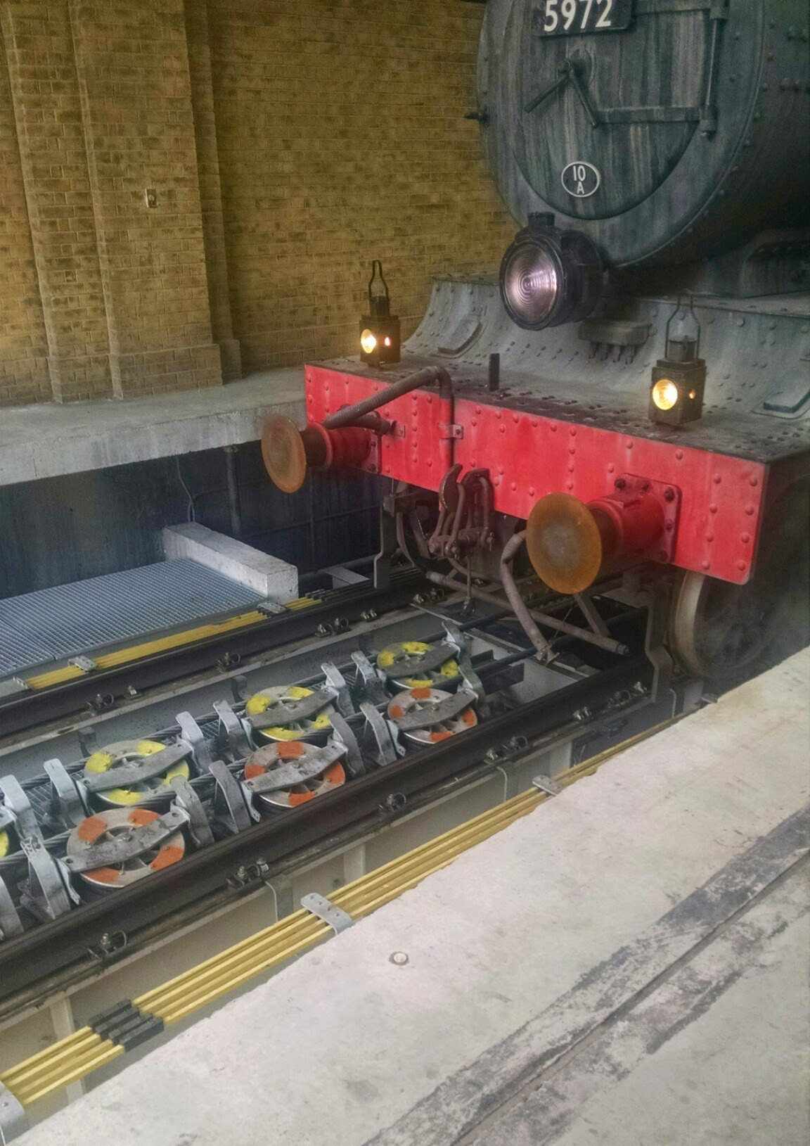 IMG_20150315_190344475